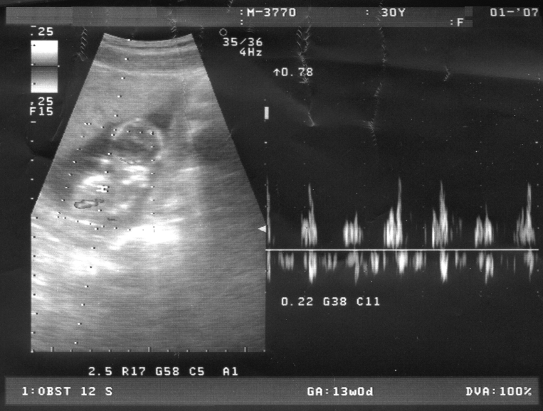 Ecografía (scan) de un feto de 13 semanas. Realizada externamente, por encima de la tripa. En la parte izquierda se puede apreciar la cabeza y el cuerpo del feto, mientras que a la derecha se muestran los latidos del corazón. El feto mide 81 mm y pesa 88 gramos.